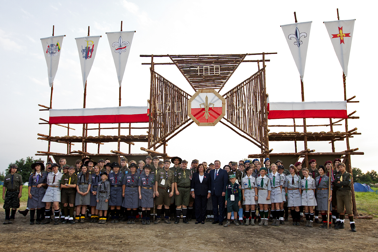 Prezydent RP Bronisław Komorowski z żoną przed głowną bramą Jubileuszowego Zlotu Stulecia Harcerstwa "Kraków 2011"